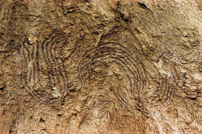 Pintures de la Sarga, abric II, panell 11: motius serpentiformes (art esquemàtic).